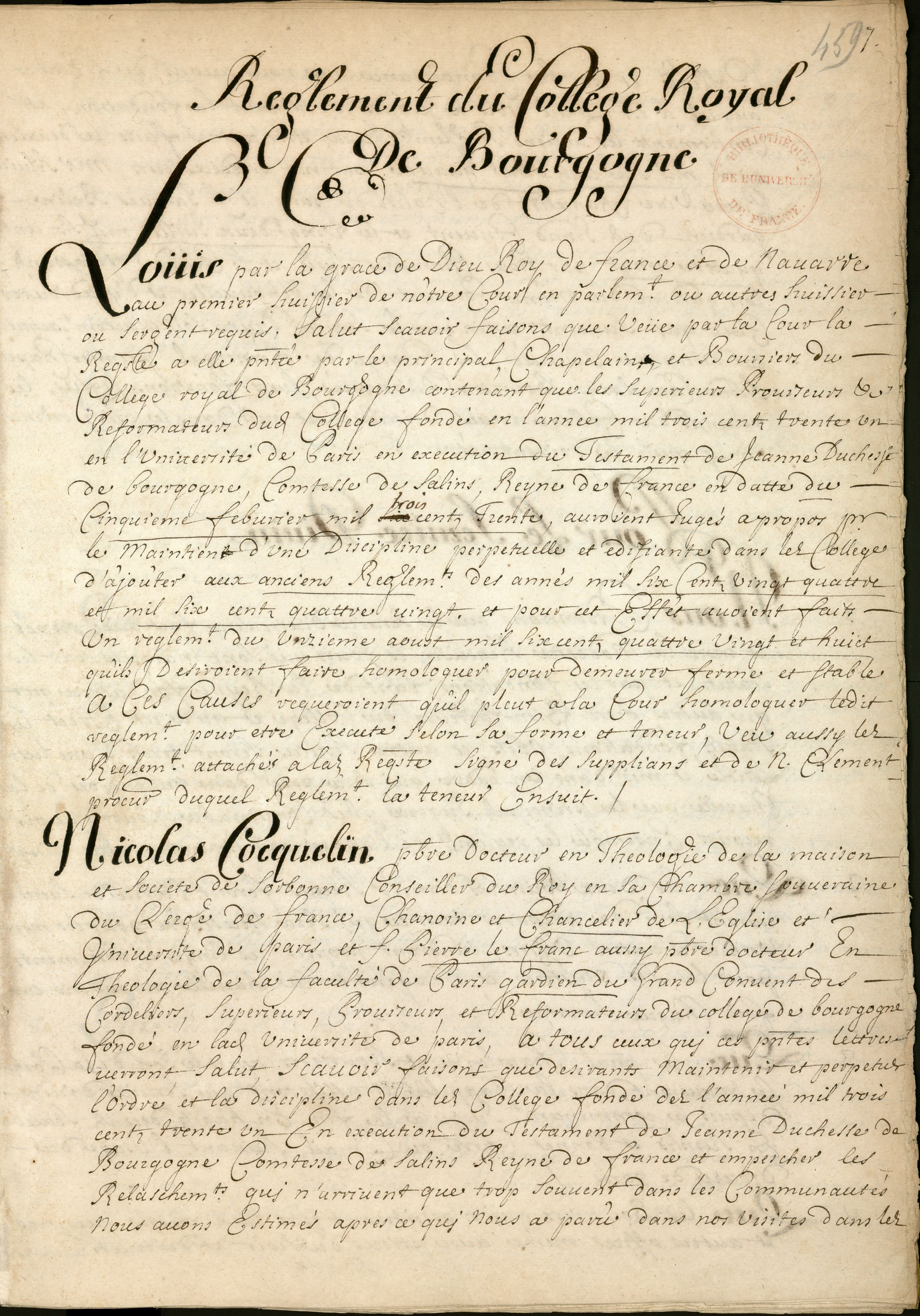 Manuscrit, dans un registre de 738 feuillets consacré aux fondations et statuts des collèges.